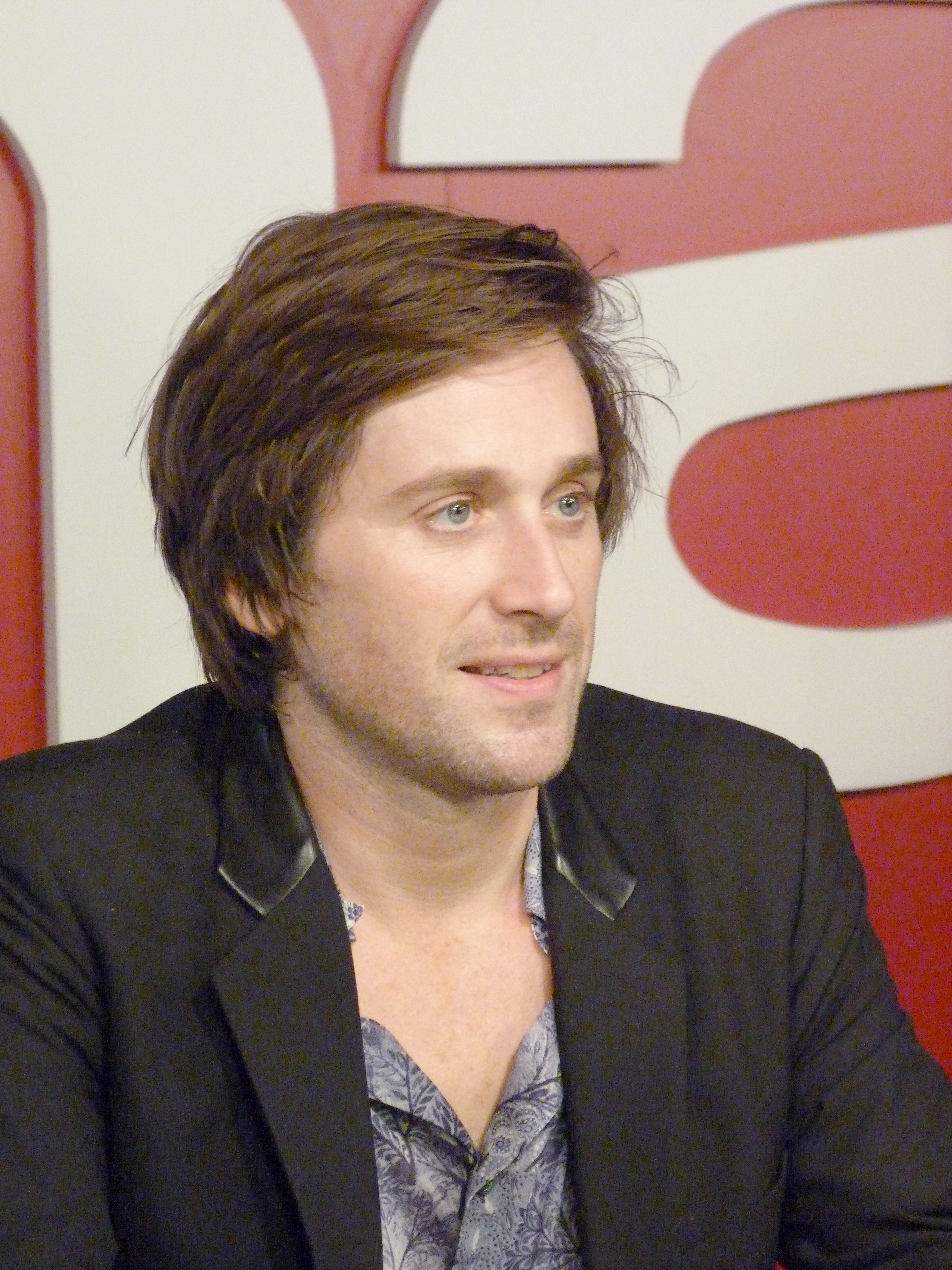 Thomas Dutronc le 12 novembre 2011 à la FNAC Montparnasse, pour la présentation et dédicace de son nouvel album Silence on tourne, on tourne en rond".